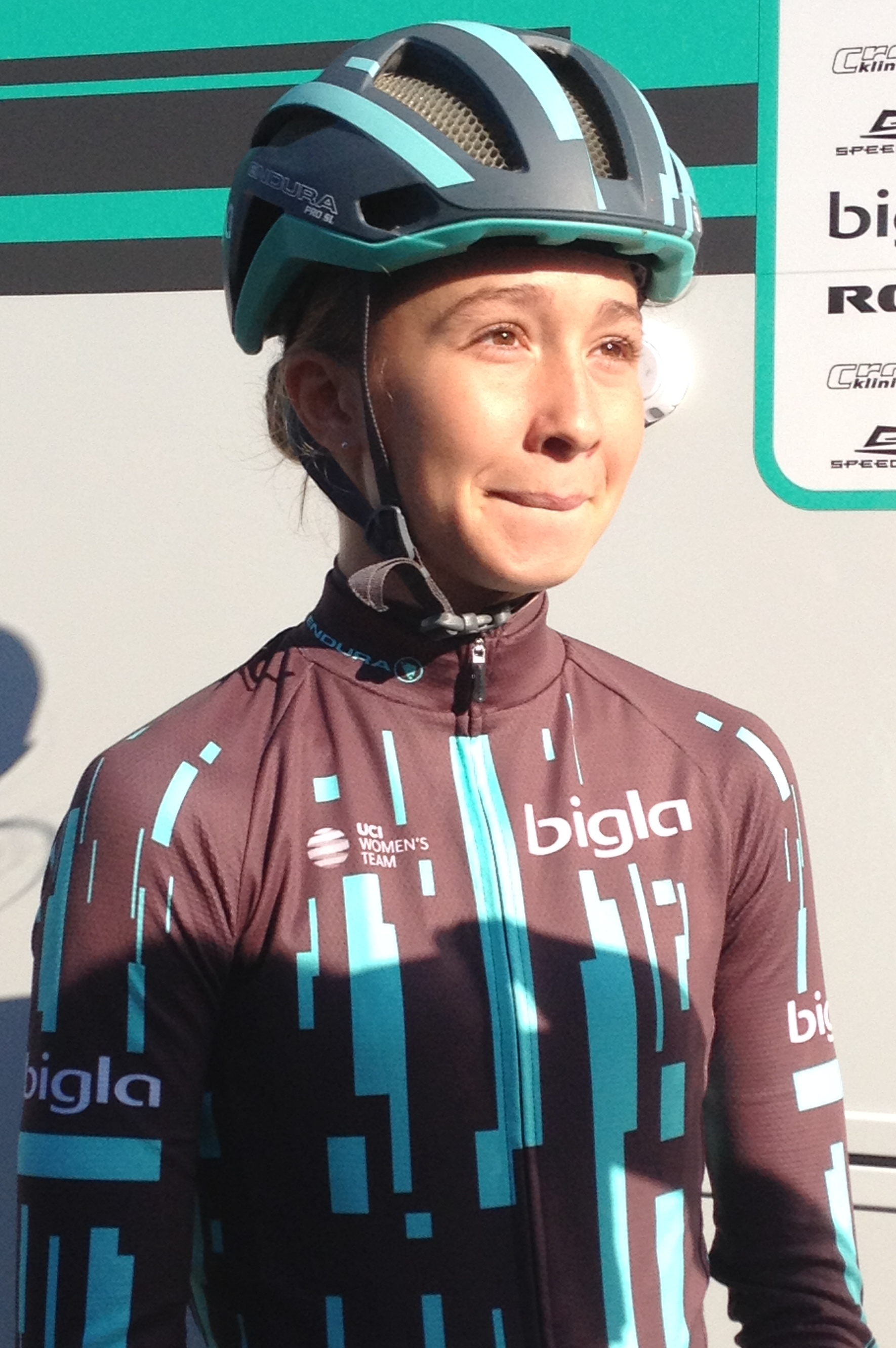 Start van de Amstel Gold Race Ladies Edition 2019 in Maastricht